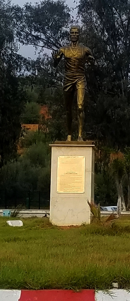 Statut de Ahmed Klouch à Hay Chegga devant le parcours Cross-Country